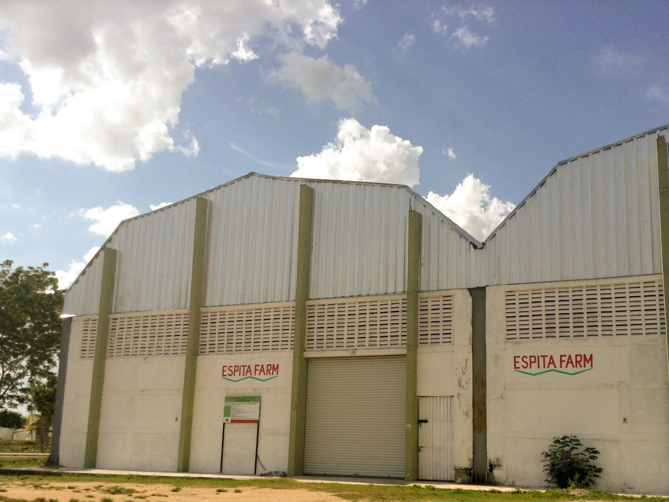 Bodegas de Espita Farm, en Espita, Yucatán.